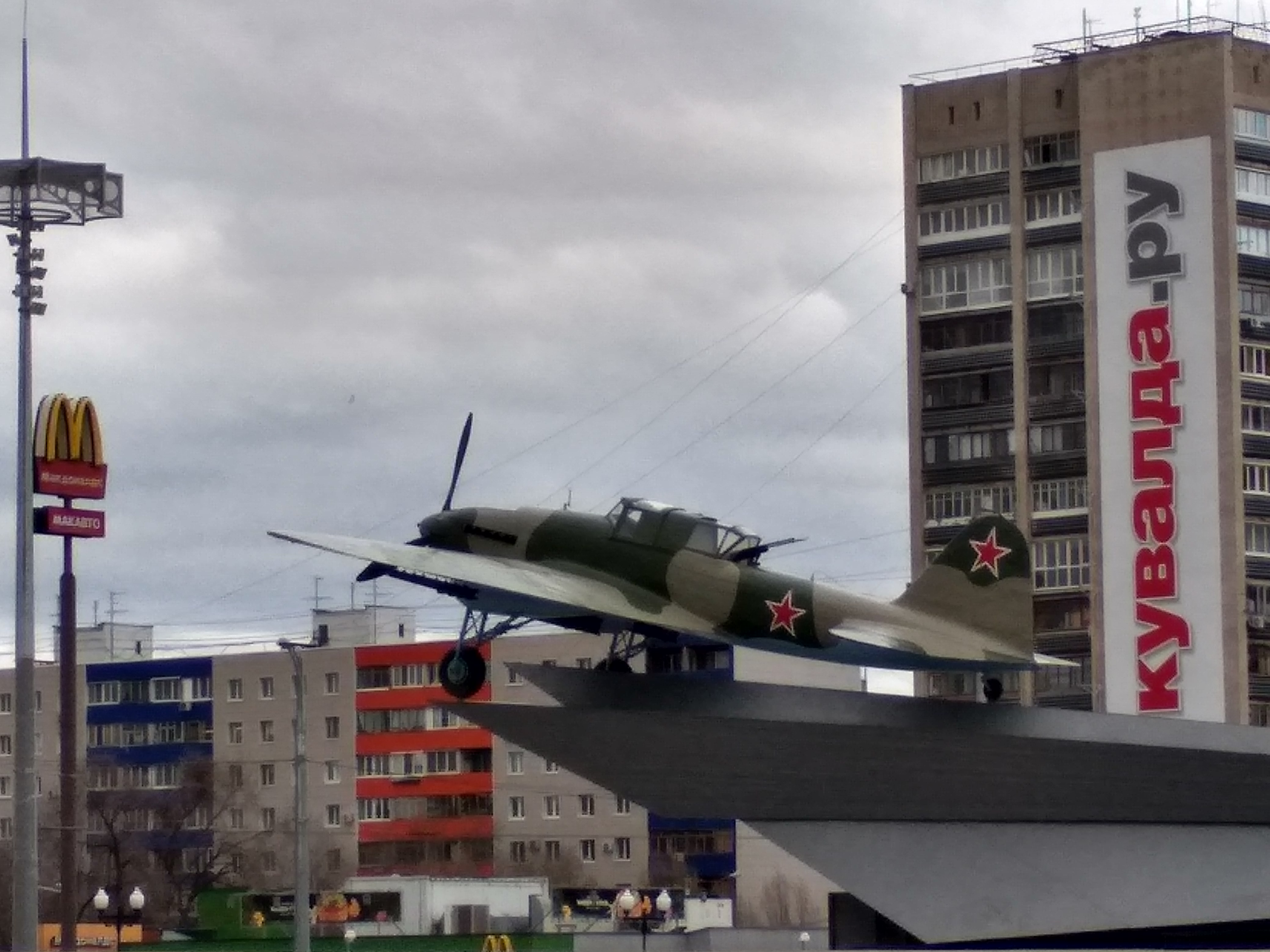 The photo was taken after reconstruction of the monument in 2018